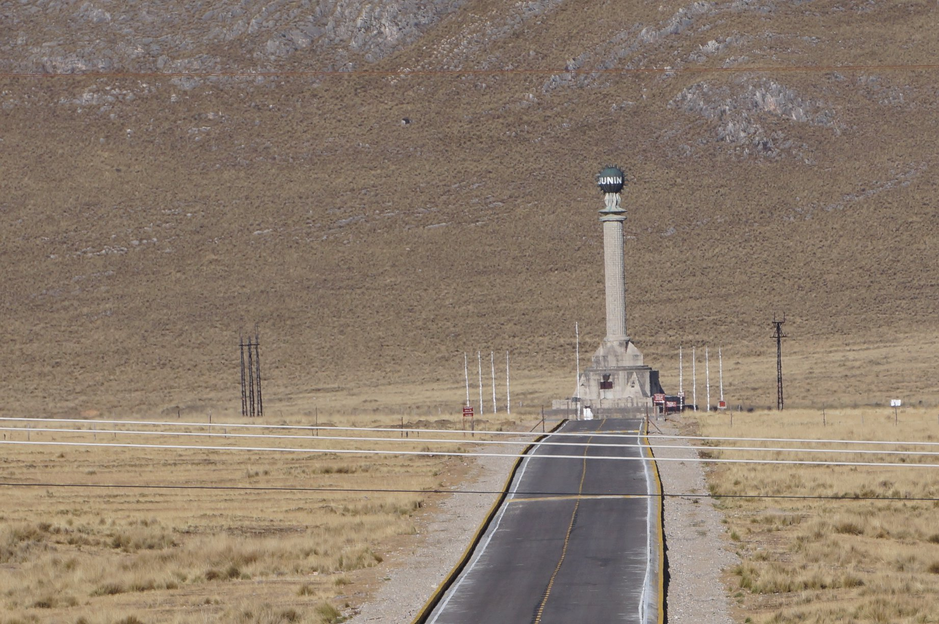 Ingreso al Obelisco de Chacamarca